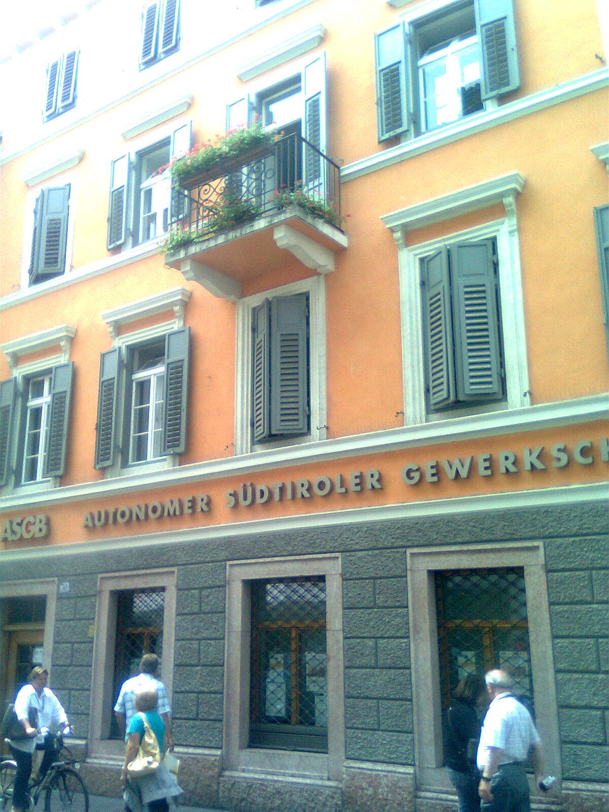 Schriftzug am Sitz des ASGB in Bozen